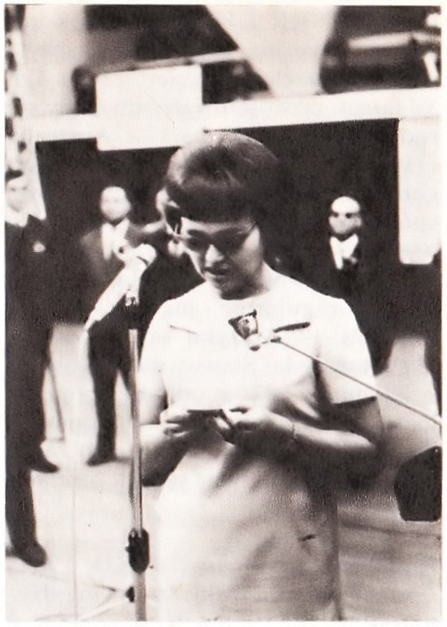 Krystyna Radzikowska (z domu Hołuj, ur. 5 lutego 1931 we Lwowie, zm. 29 listopada 2006) – najwybitniejsza polska szachistka lat 50. i 60. XX wieku, wielokrotna mistrzyni Polski w szachach.